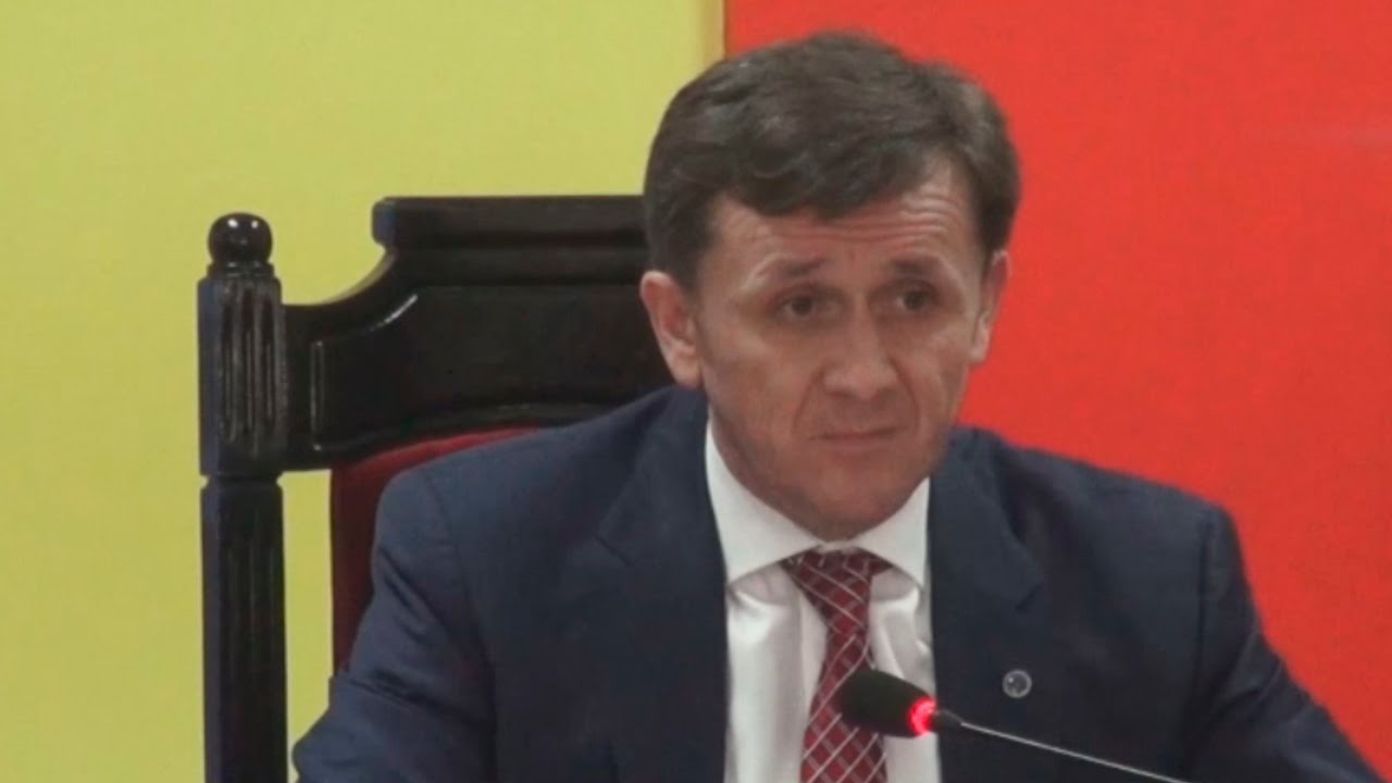 Iurie Ciocan